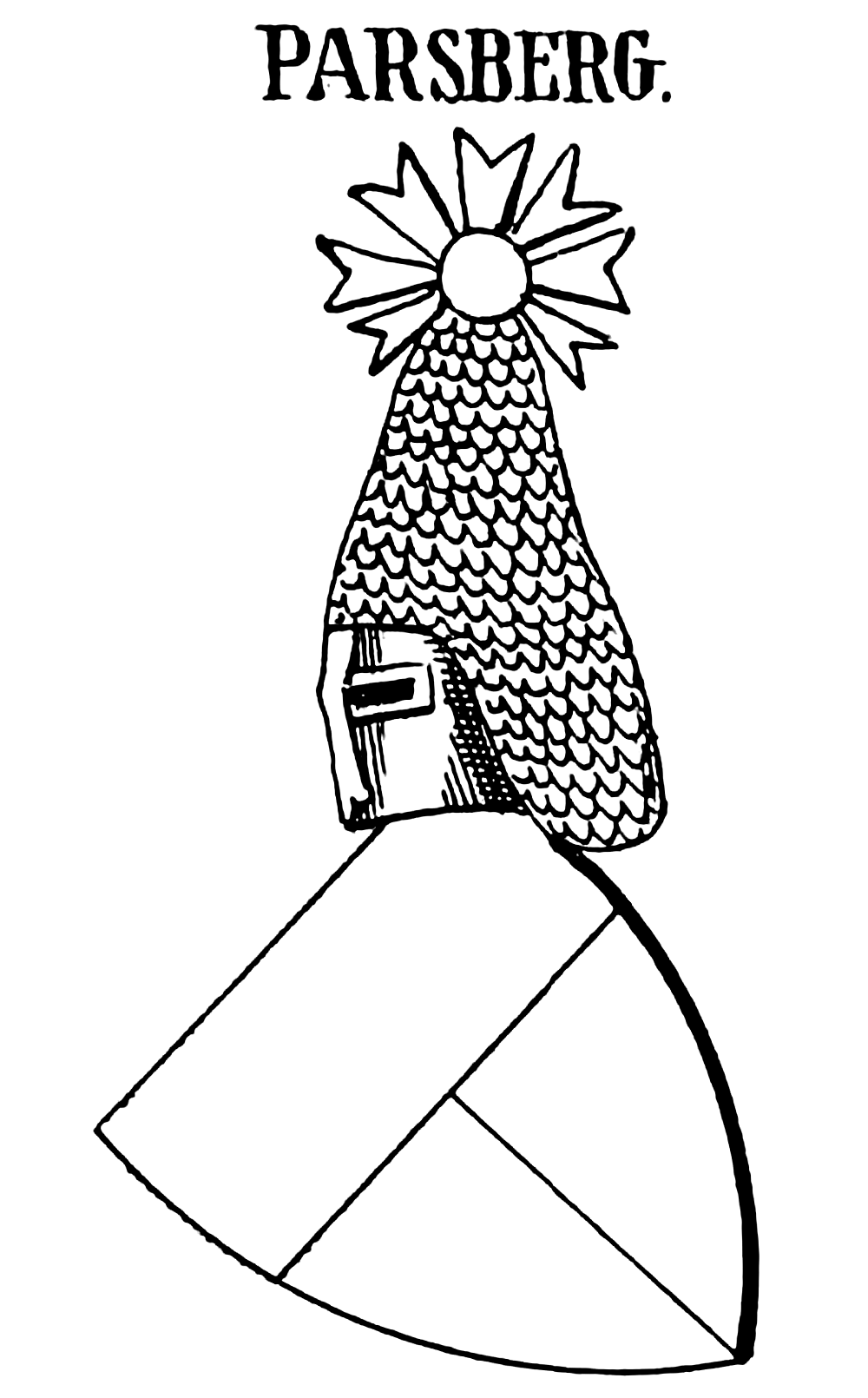 Wappen derer von Parsberg (Adelsgeschlecht), nach Siebmacher: Siegels des Dietrich von Parsberg (1298), mit Helmzierde (Pelzhaube, darauf ein Knopf, welcher ringsherum mit Armen eines Malteserkreuzes besteckt ist)